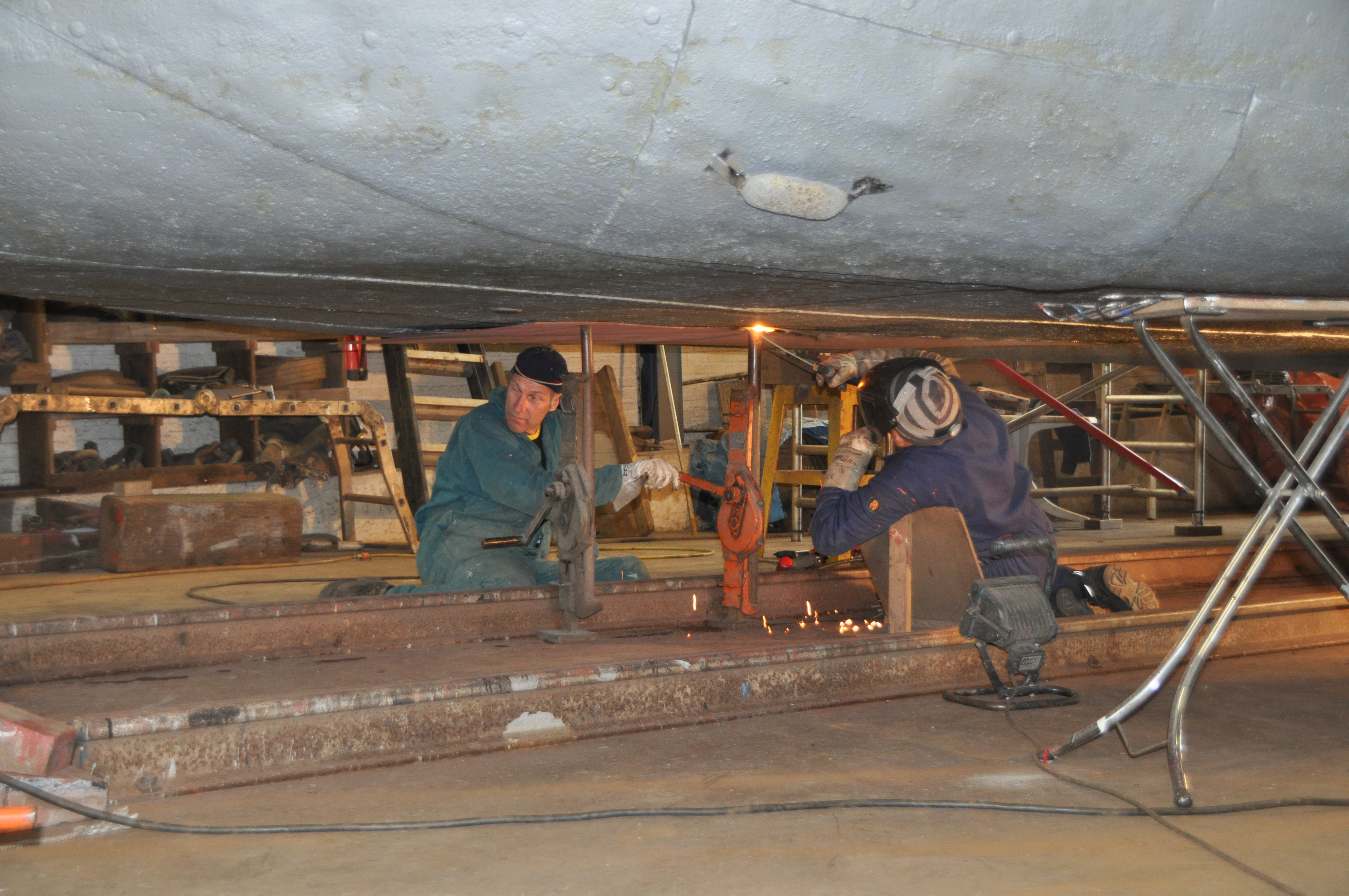 Het aanbrengen van een dubbelplaat onder de Stella Maris.